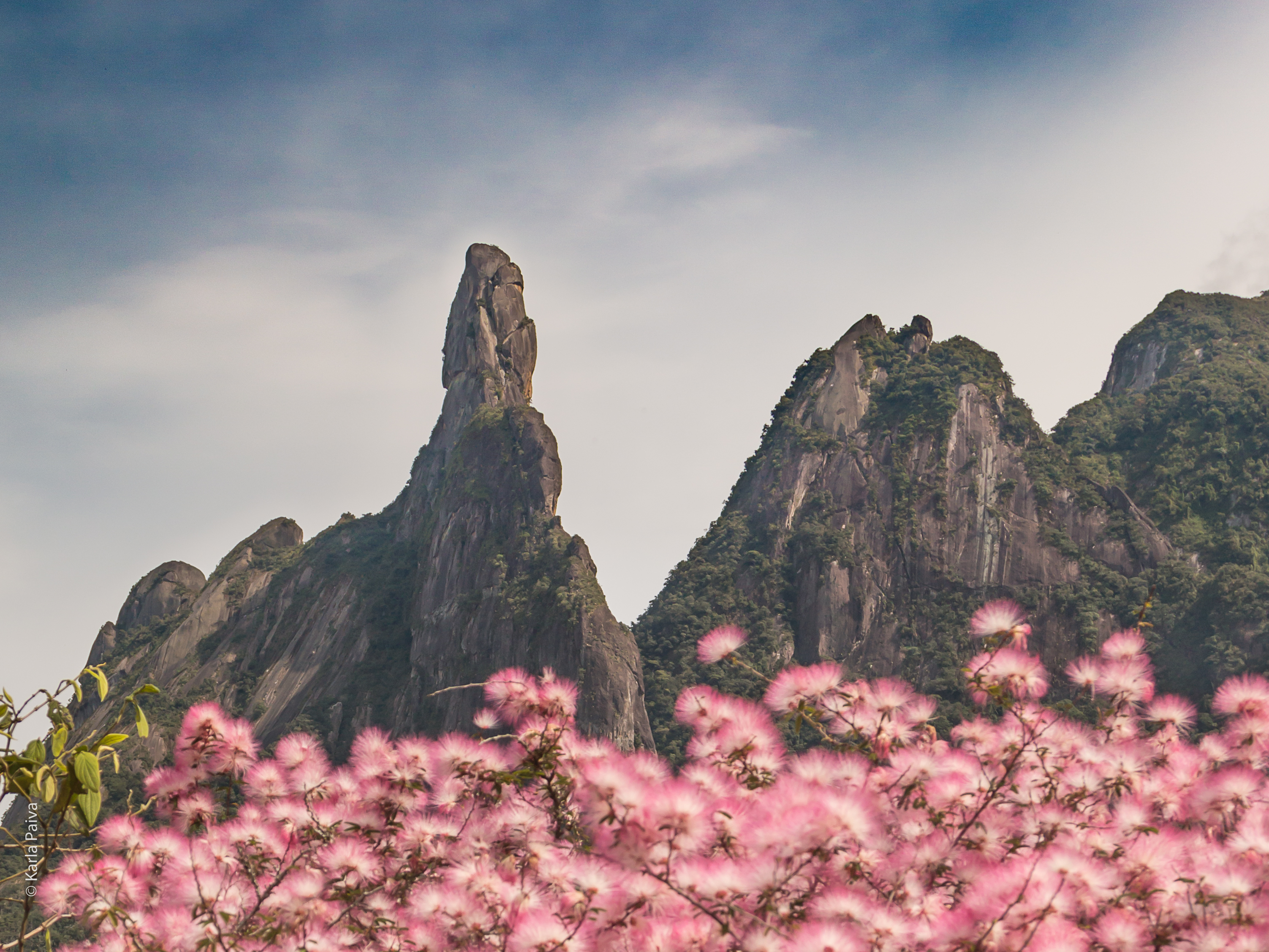 Estrada para Teresópolis.